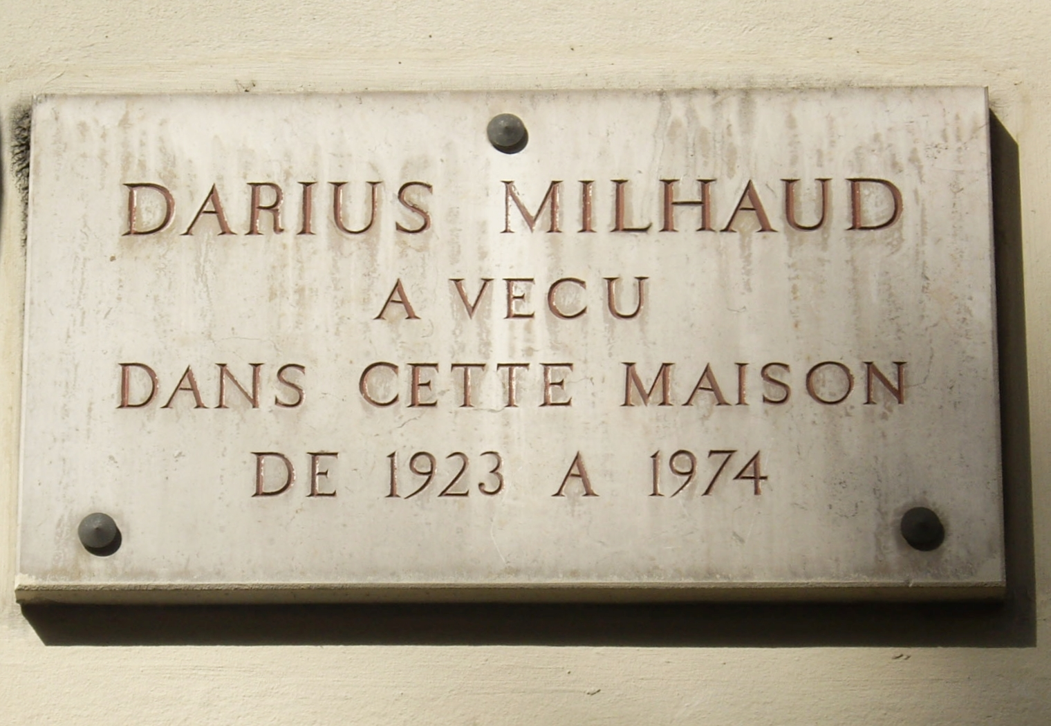 Plaque commémorative, 10 boulevard de Clichy, Paris 18e. « Darius Milhaud a vécu dans cette maison de 1923 à 1974. »